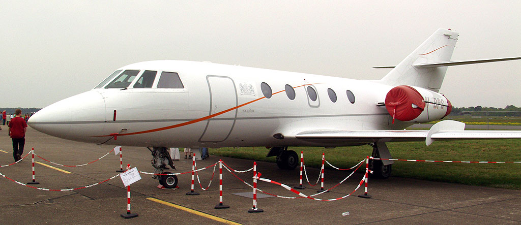 Dassault Aviation Falcon 20F-5 (PH-BPS) auf der Flugzeugshow am Airport Niederrhein während der Geburtstagsfeier zum einjährigen Bestehens des Flughafens.